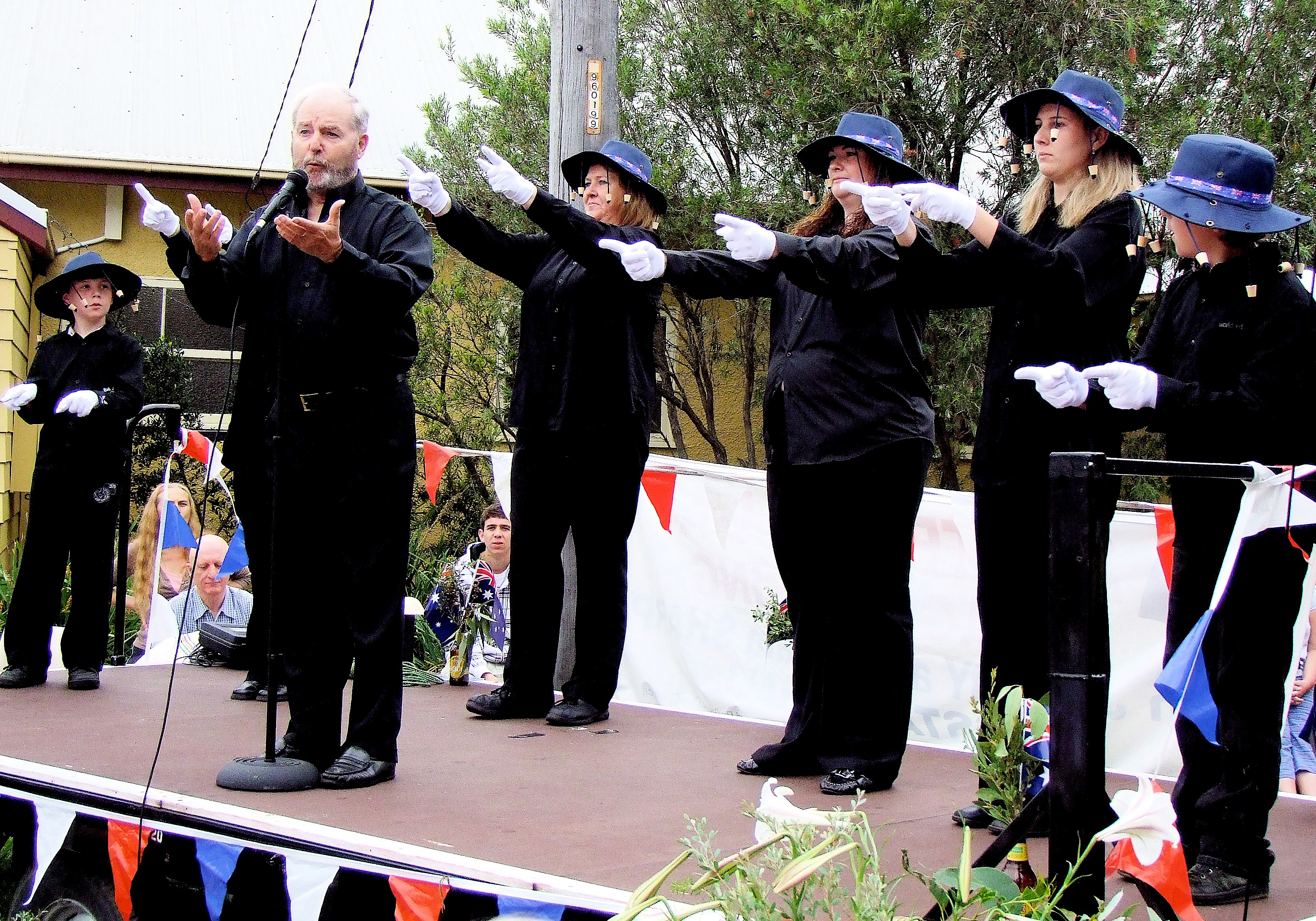 Auftritt eines australischen Gebärdenchors unter Leitung von Chris Dillon am "Australia Day" 2009 in Wagstaffe in New South Wales, Australien.